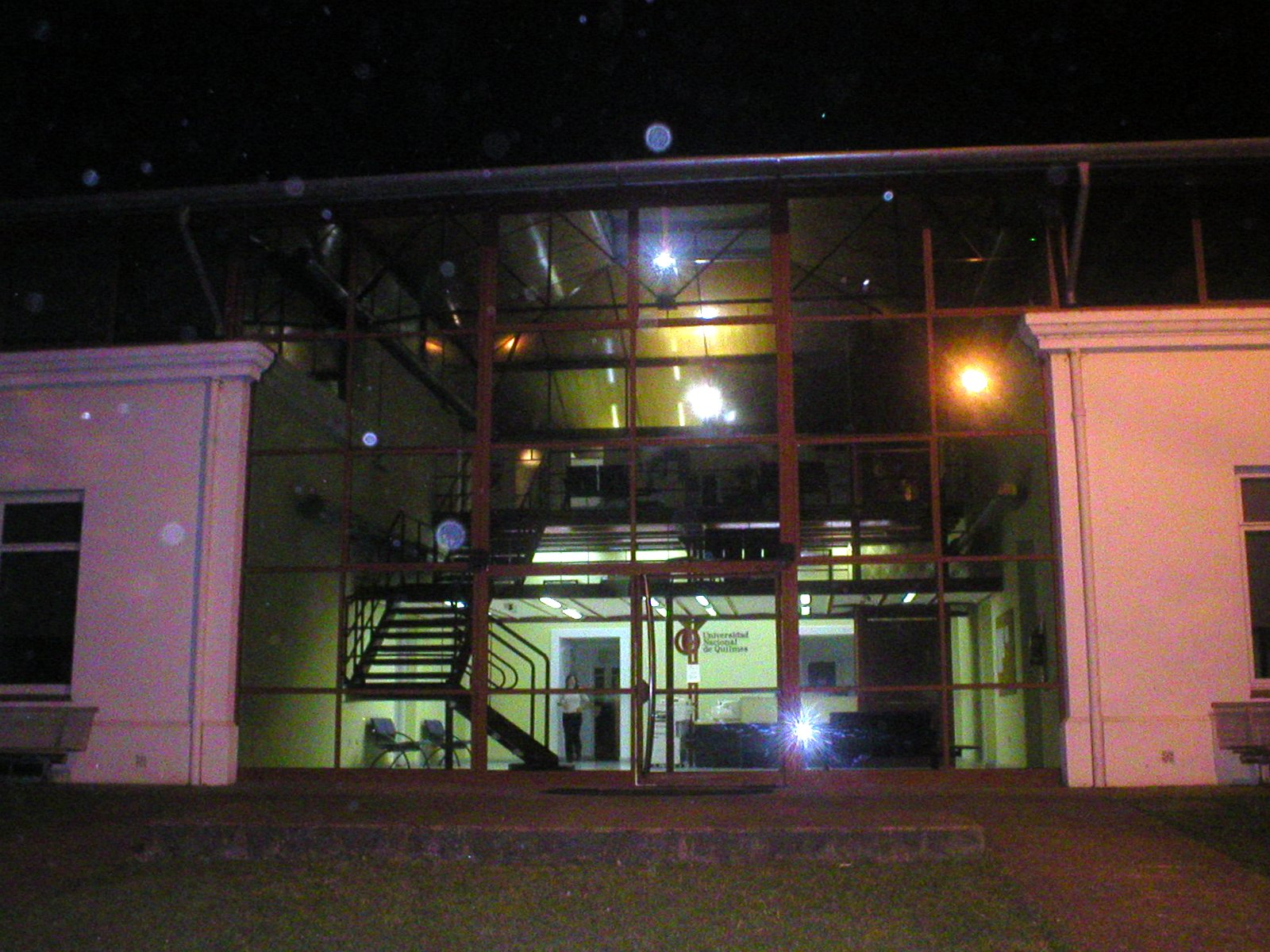 Edificio Rectorado Universidad Nacional de Quilmes, toma nocturna.